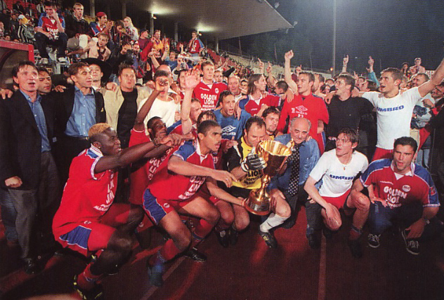 Meistertitel 1999